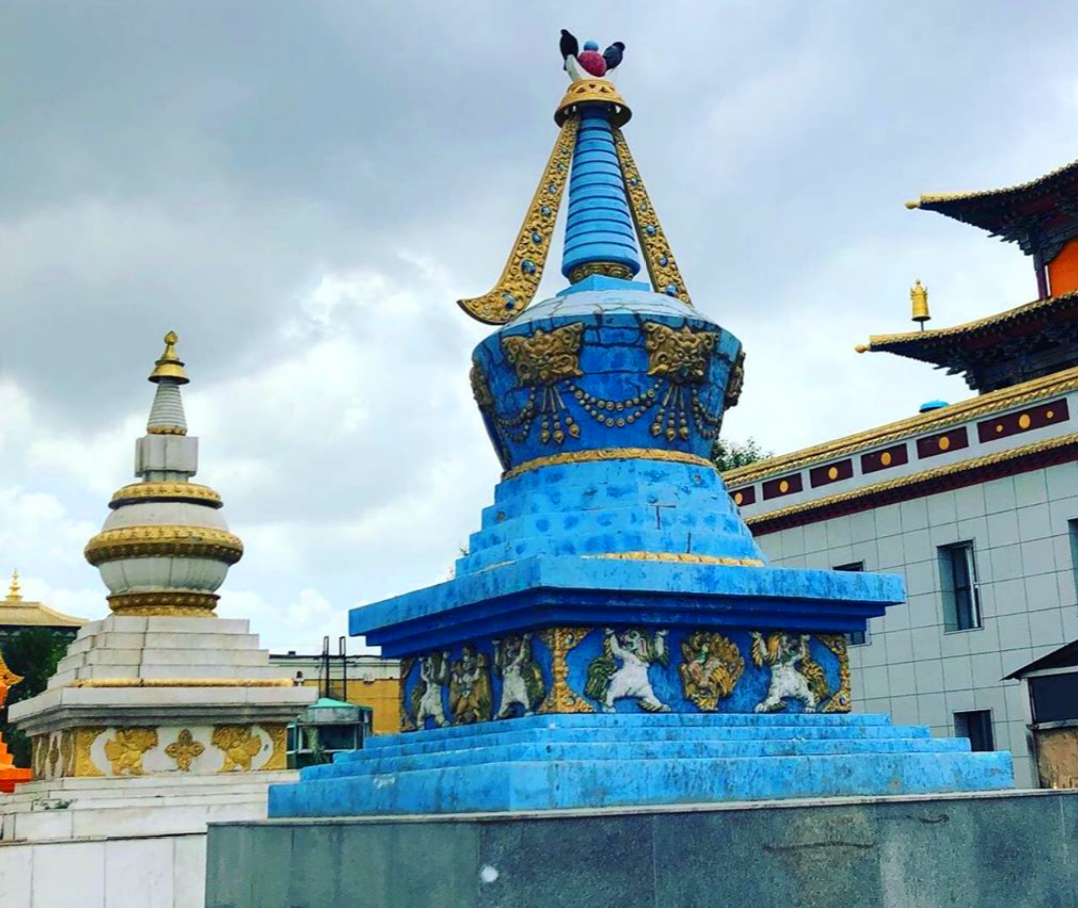 Buddhist stupas in the monastery